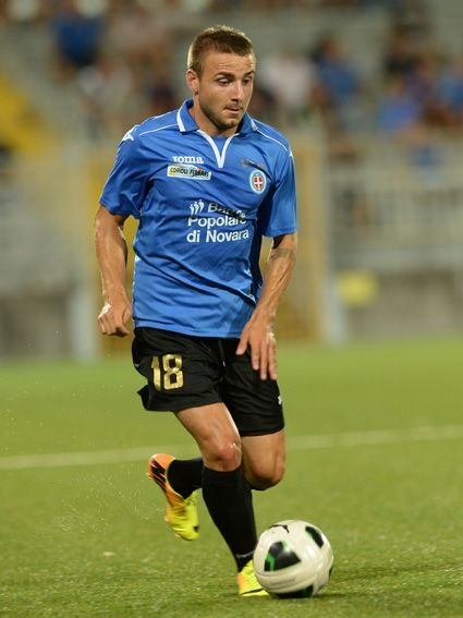 Filip Pivkovski Novara Calcio